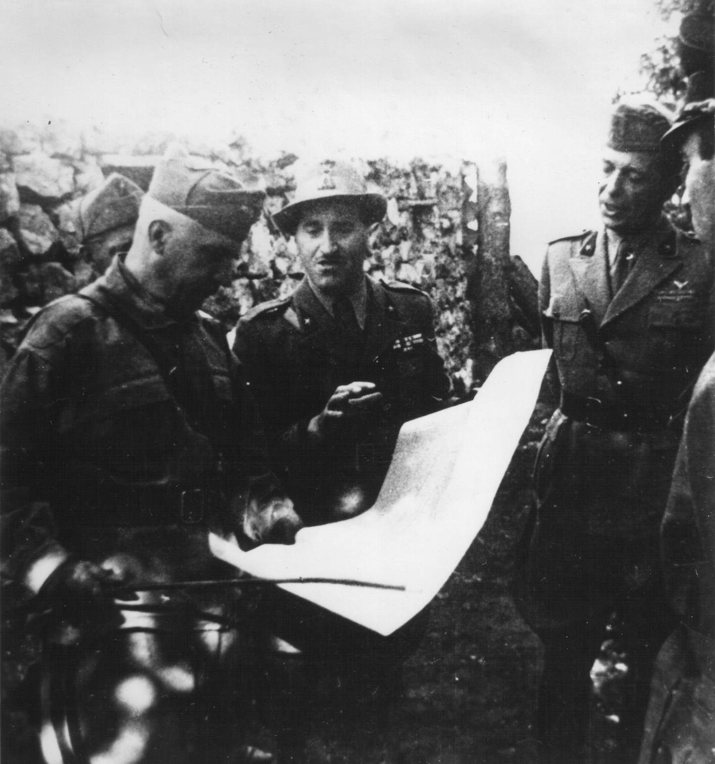 Srpskohrvatski / српскохрватски: Italijanski general Mario Robotti i general Orlendi na položaju u Sloveniji, tokom operacije Ljubljanska pokrajina 1942.